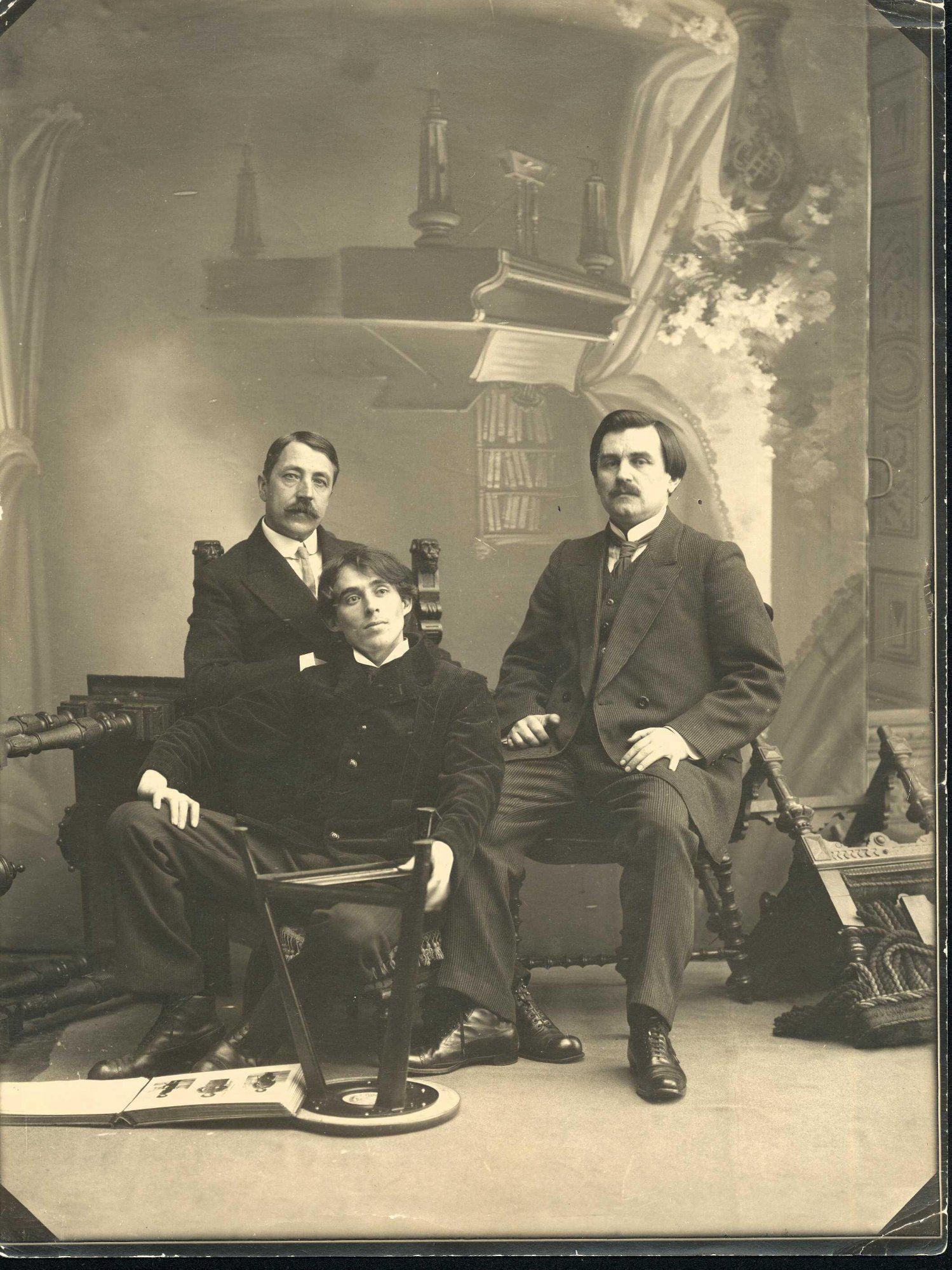 M. Matjuschin, A. Krutschenych, K. Malewitsch